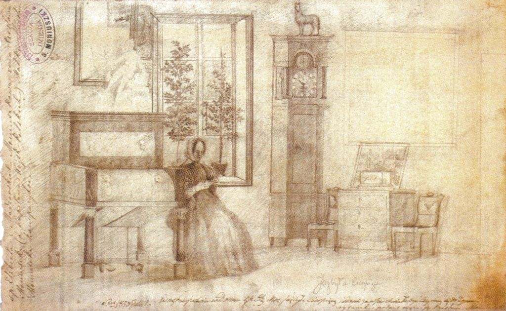 Беларуская (тарашкевіца): Менск (Miensk), завулак Музычны (zavułak Muzyčny). Дом масонаў, Альжбета Манюшка (Alžbieta Maniuška) з роду Маджарскіх (Madžarski)